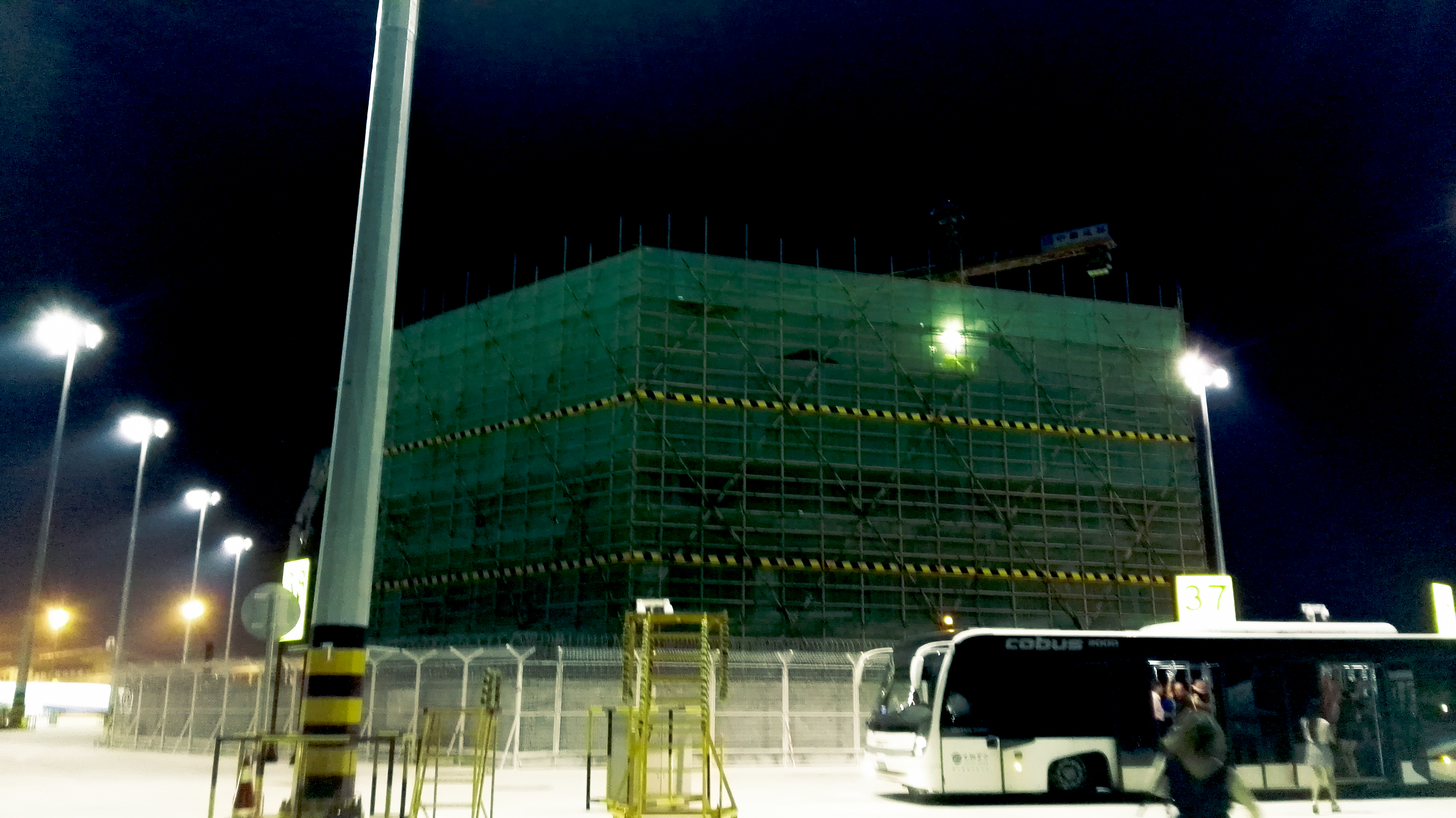 长乐机场正在建设的新航站楼